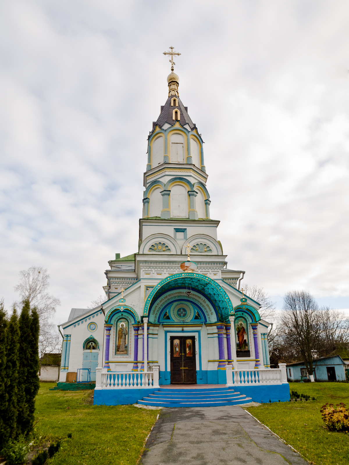 Іллінська церква (мур.), Чорнобиль